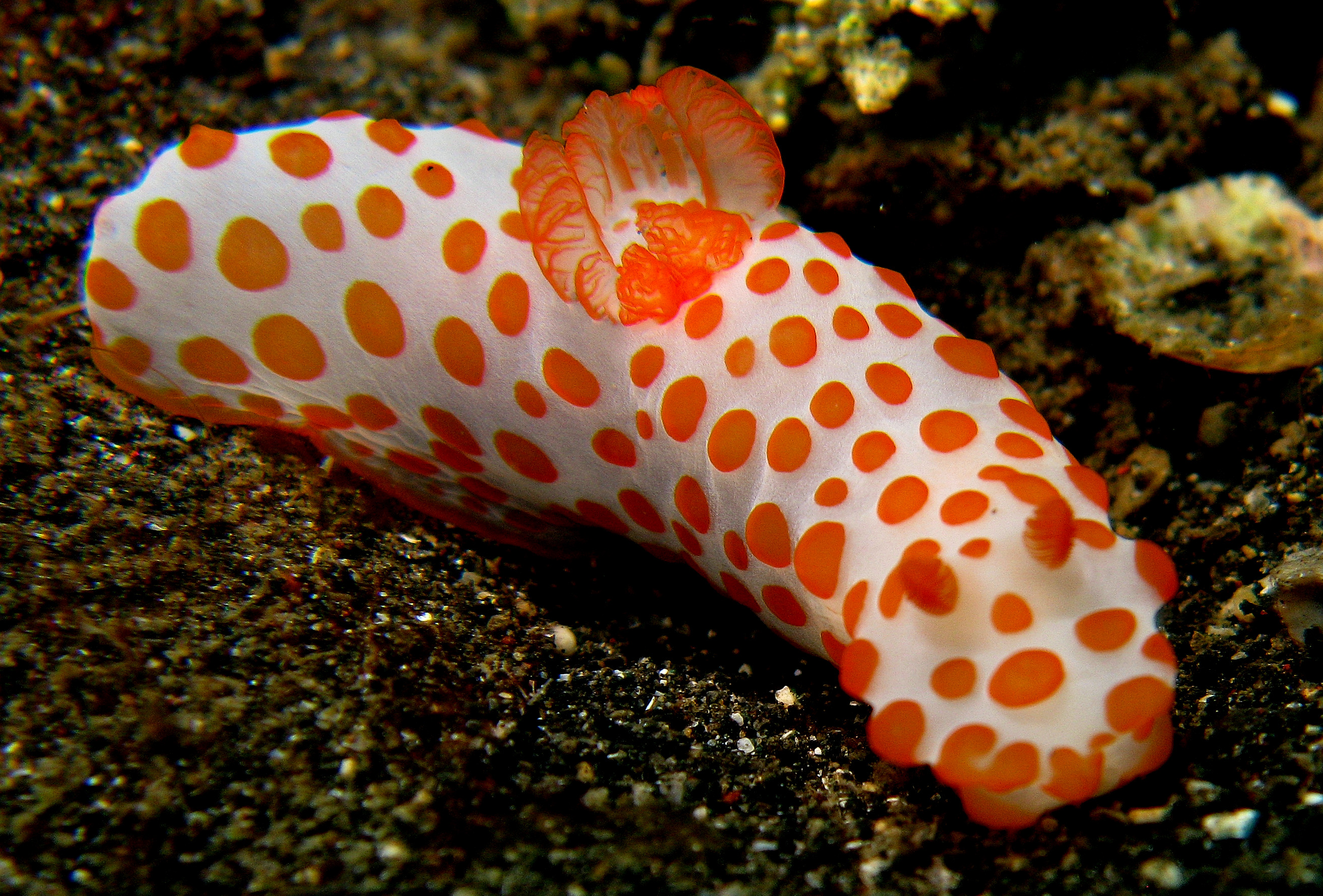 Gymnodoris impudica, Lembeh, Indonesia